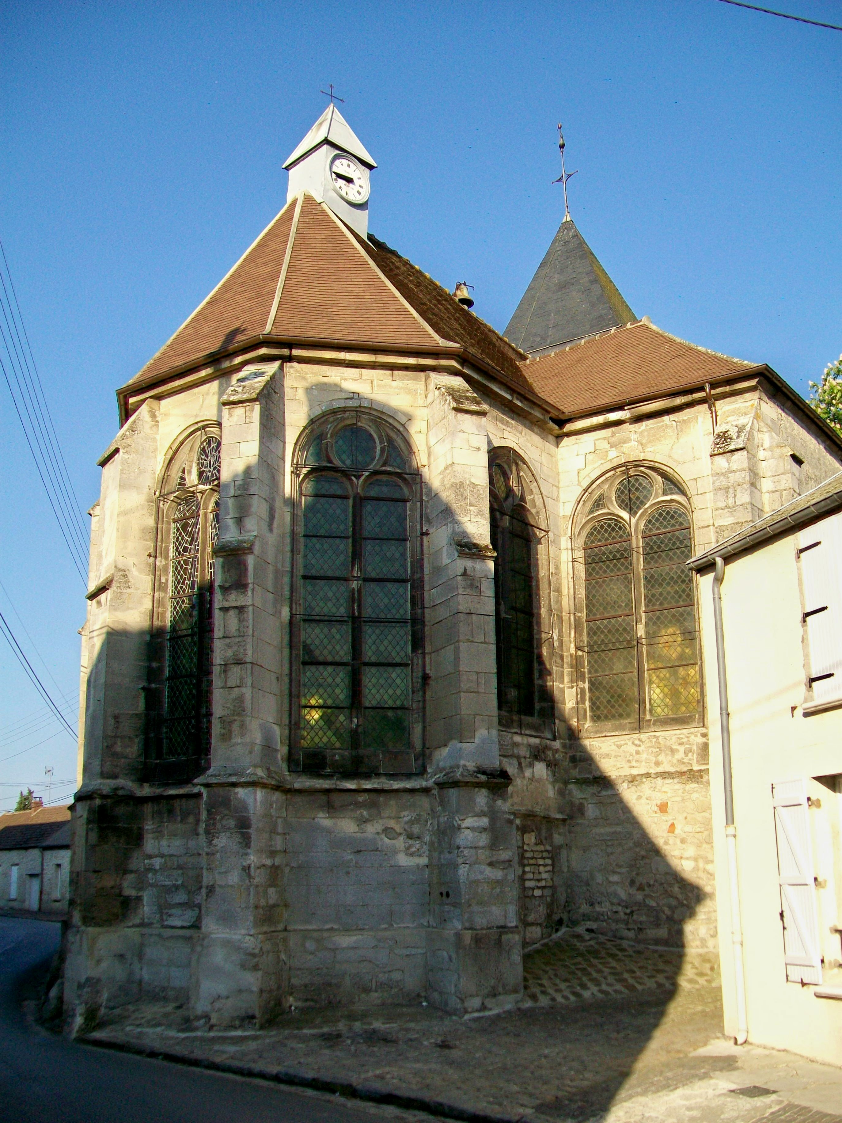 Le chœur de l'église Saint-Rémi, à pans coupés, du XVe ou XVIe siècle. L'on voit par l'aspect homogène des fenêtres qu'il a apparemment été construit en même temps que le transept, alors que les murs aveugles du transept vers le sud et vers le nord donnent une autre impression. Le chœur se distingue par son étroitesse, mais aussi par son élégance simple qui contraste avec la rusticité de l'église.